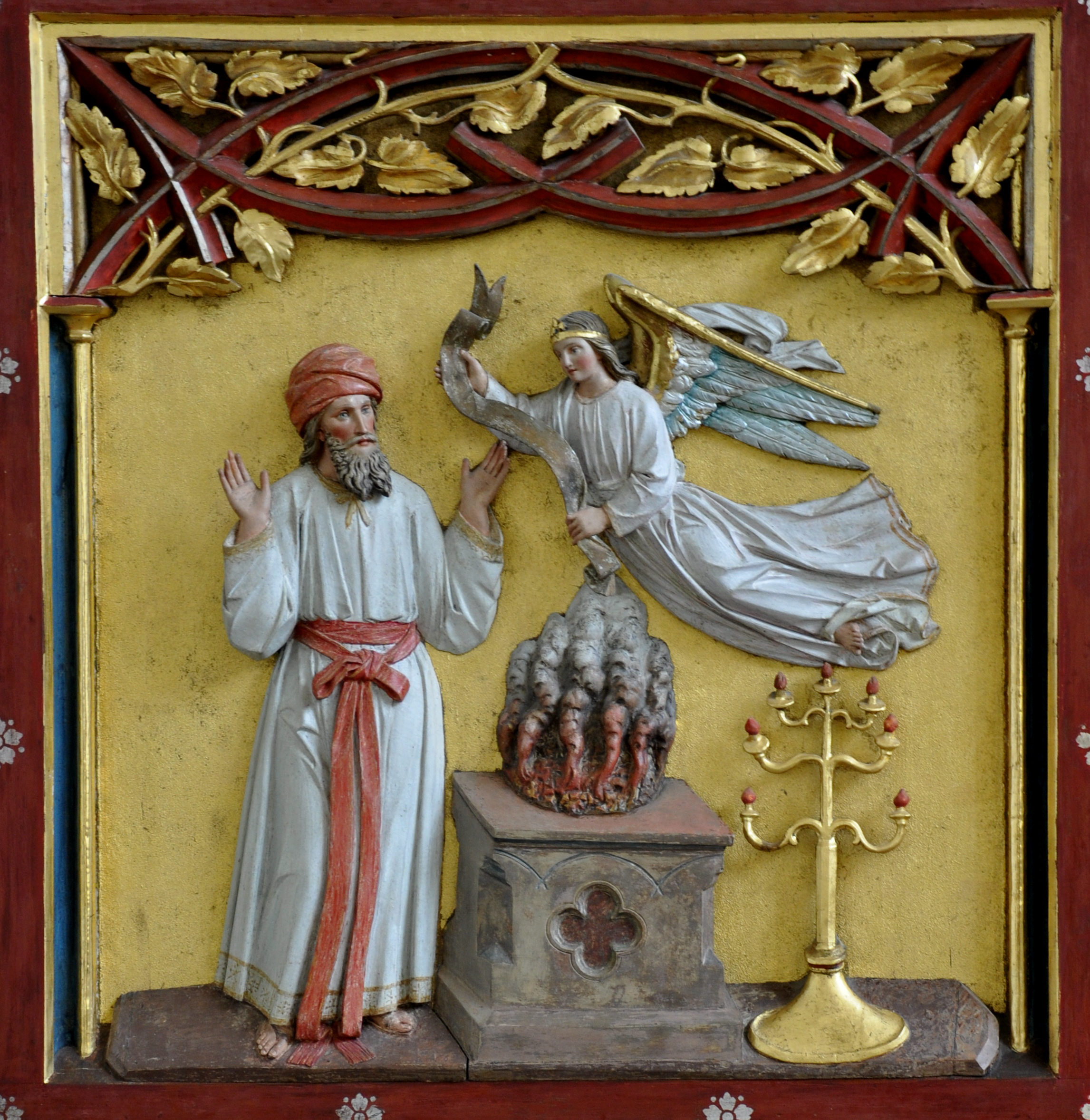 Friedrichshafen, Ortsteil Ailingen, Katholische Pfarrkirche St. Johannes Baptist, Altar an der Chorrückwand, 1985 aufgestellte Zusammenstellung von Teilen der ehemaligen neugotischen Ausstattung der Kirche Seitenflügel links, vom 1958 abgebrochenen Hochaltar von Anselm Sickinger, 1862; Opfer